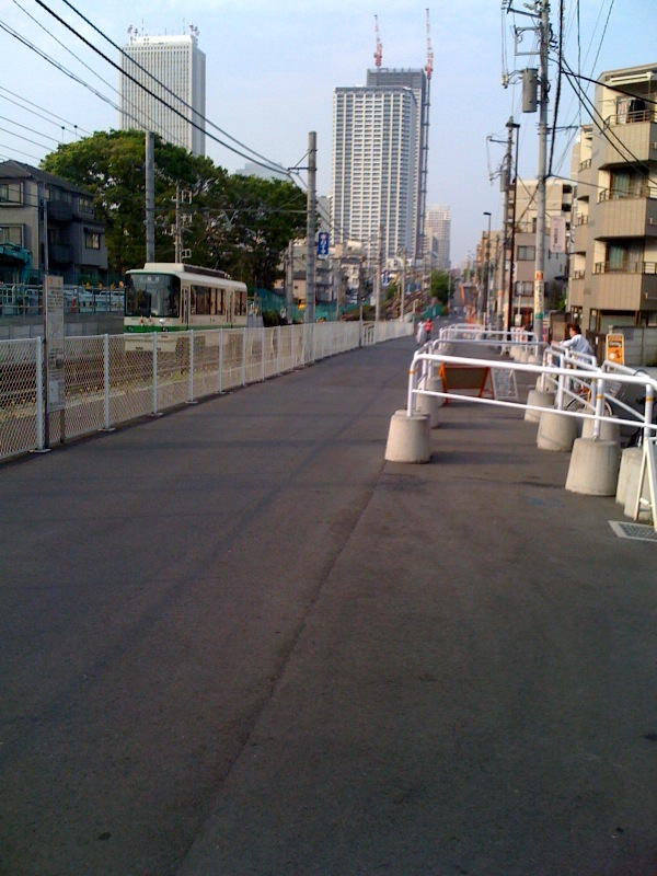 明治通りバイパス予定地